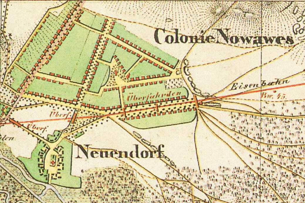 Neuendorf und Nowawes, heute Stadtteil Babelsberg, Potsdam, Brandenburg, auf dem Urmesstischblatt 3644 Potsdam von 1835